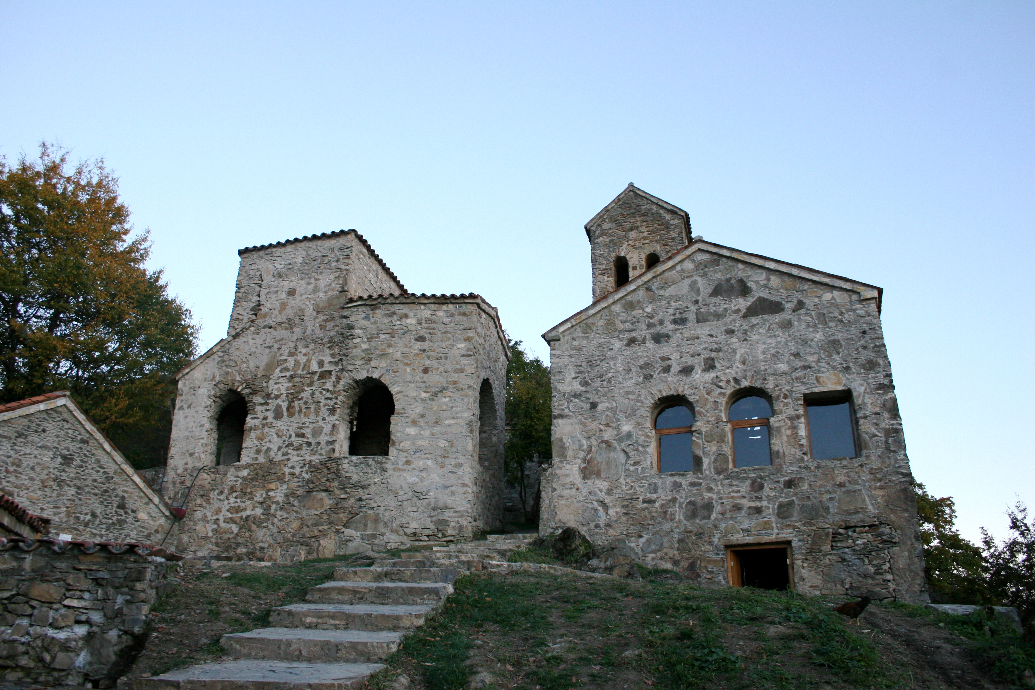 ნეკრესის მონასტრის ხედი შიდა ეზოდან